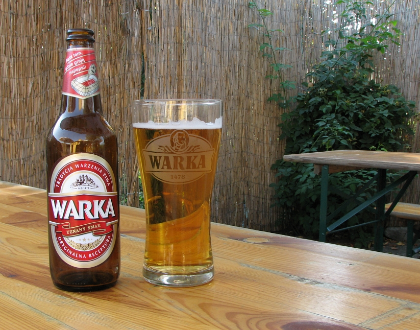 warka